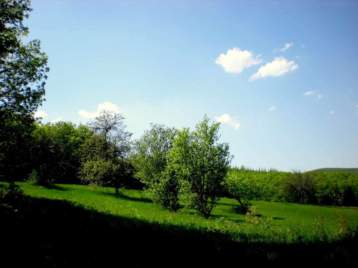 Countryside - Gjilan